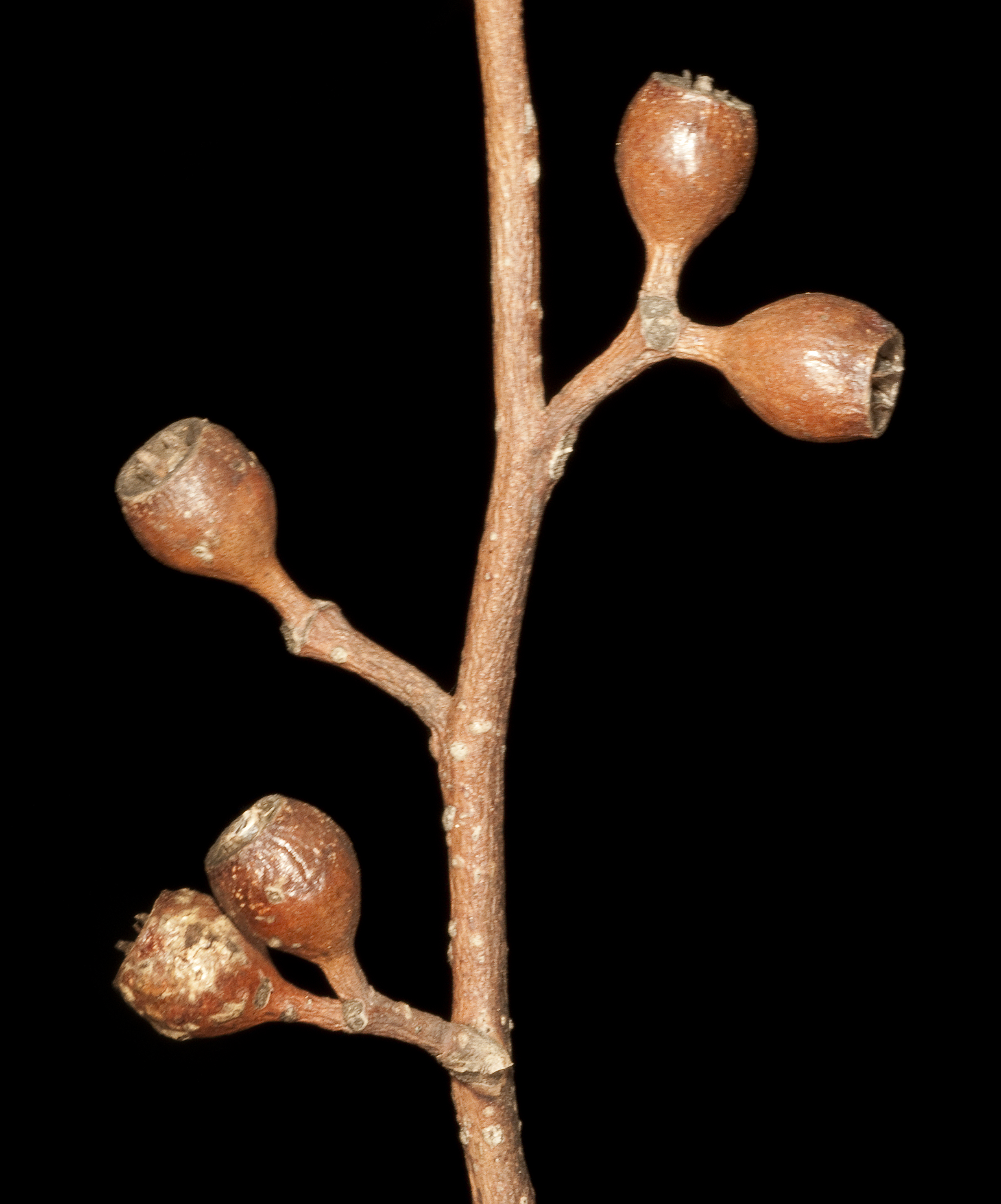 KRT4535